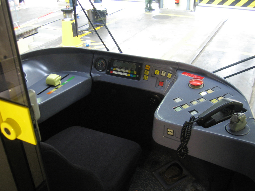 Cabine d'un TFS de la ligne T1 du tramway de Paris. JPO Atelier de Bobigny 24/05/2008.